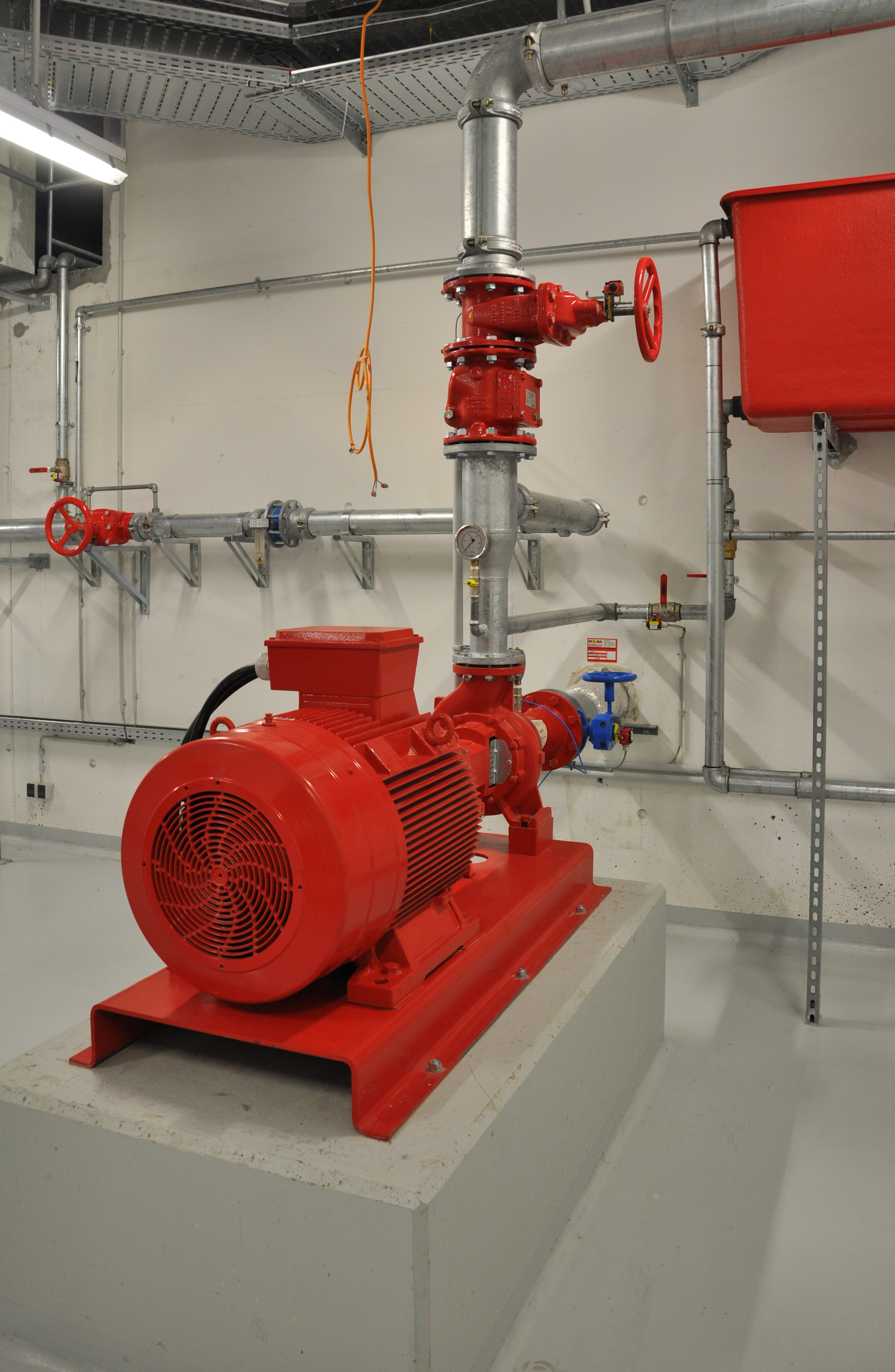 Ravensburg, Krankenhaus St. Elisabeth, Technikzentrale im Untergeschoss des neuen Bettenhauses (am Tag der offenen Tür 2013) , Sprinklerzentrale, Pumpe